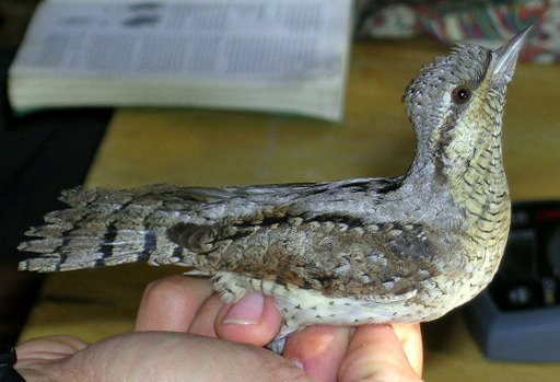 סבראש, מוחזק ביד